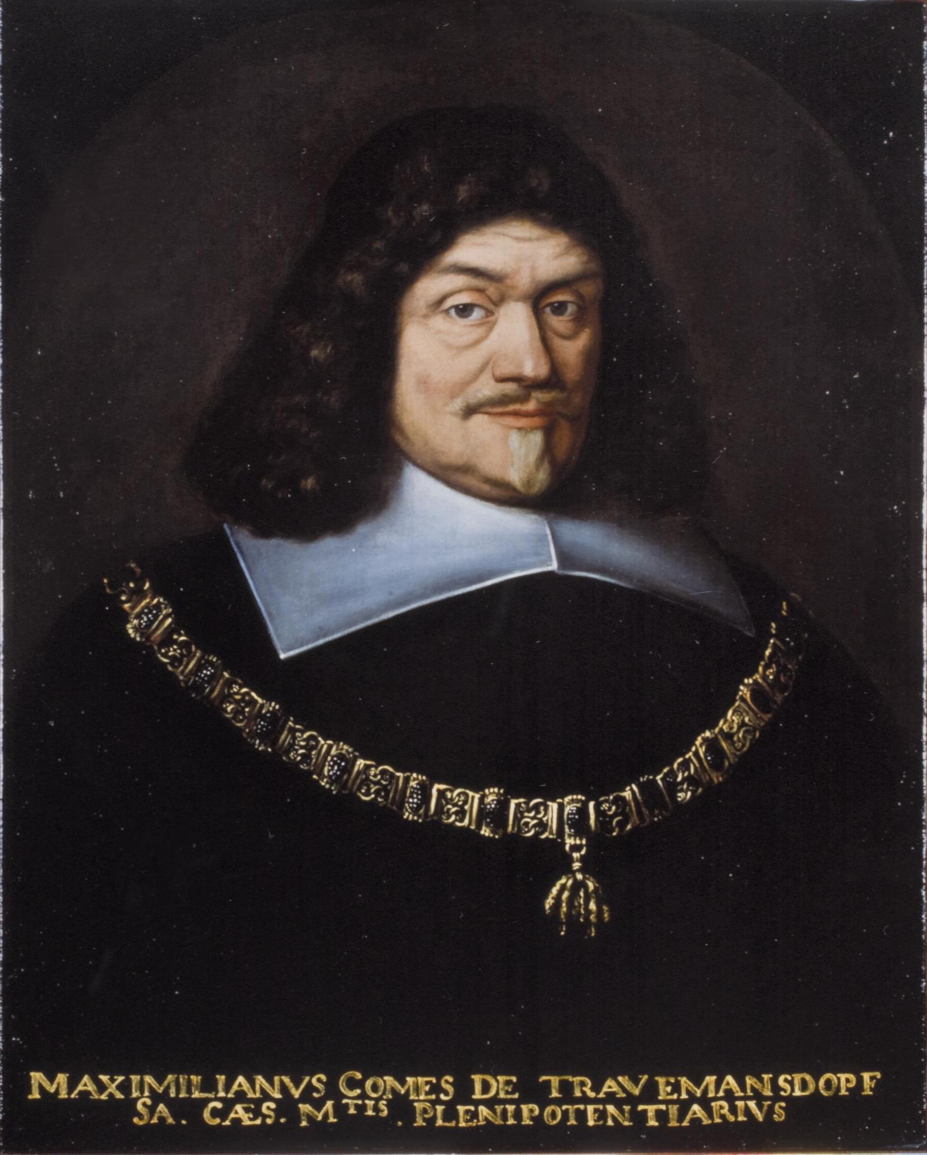 Maximiliaan Trauttmannsdorf (1584-1650), 1648-1649 Münster, Historisches Rathaus Münster (Friedenssaal)